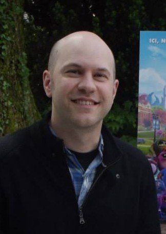 Dan Scanlon au Festival International du Film d'Animation d'Annecy le 10 juin 2013